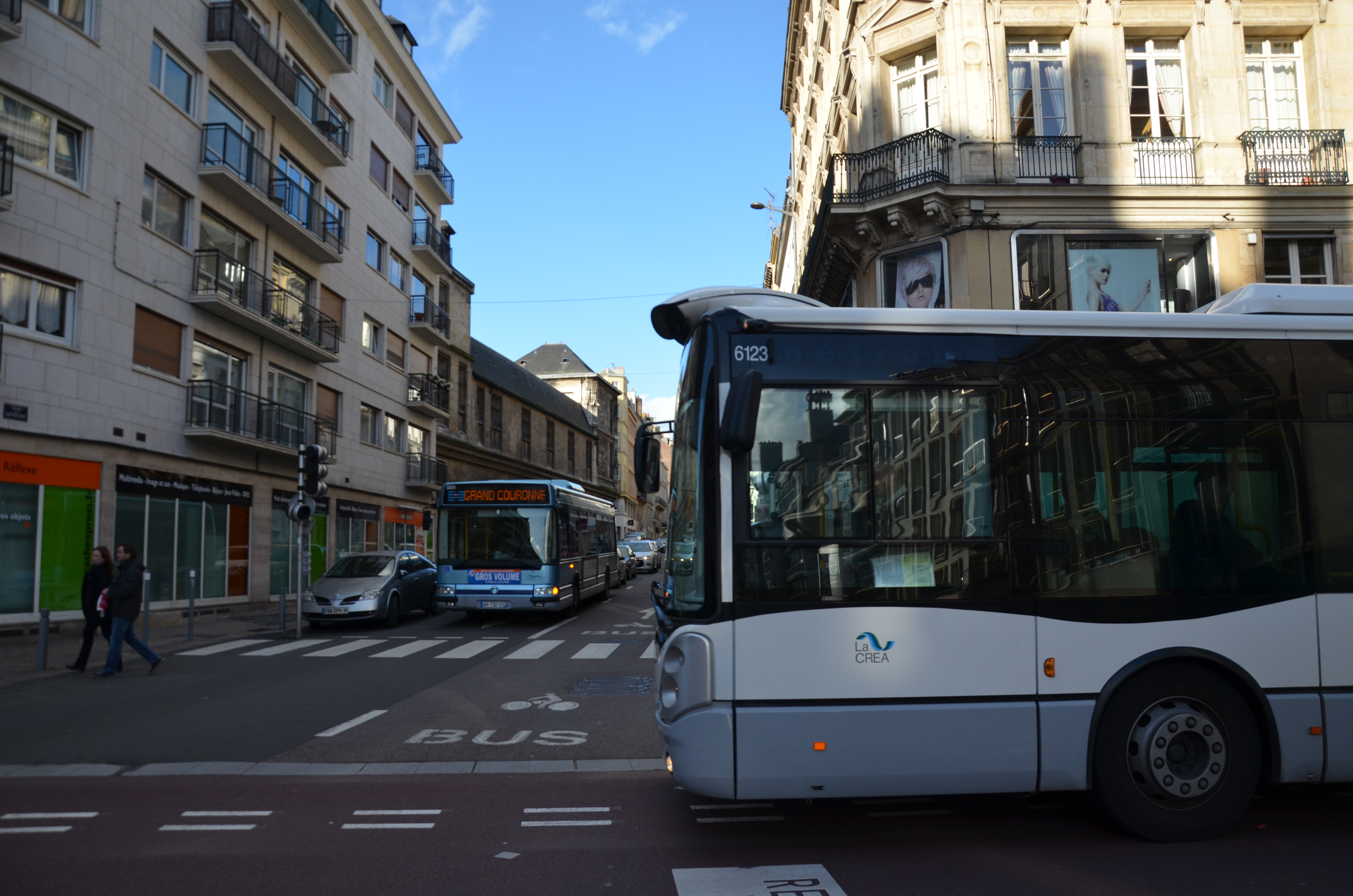 Croisements entre Irisbus Citelis 18 n°6123 et Irisbus Agora S n°5004 à République, entre les lignes TEOR et les lignes classiques de Rouen sur le réseau ASTUCE.